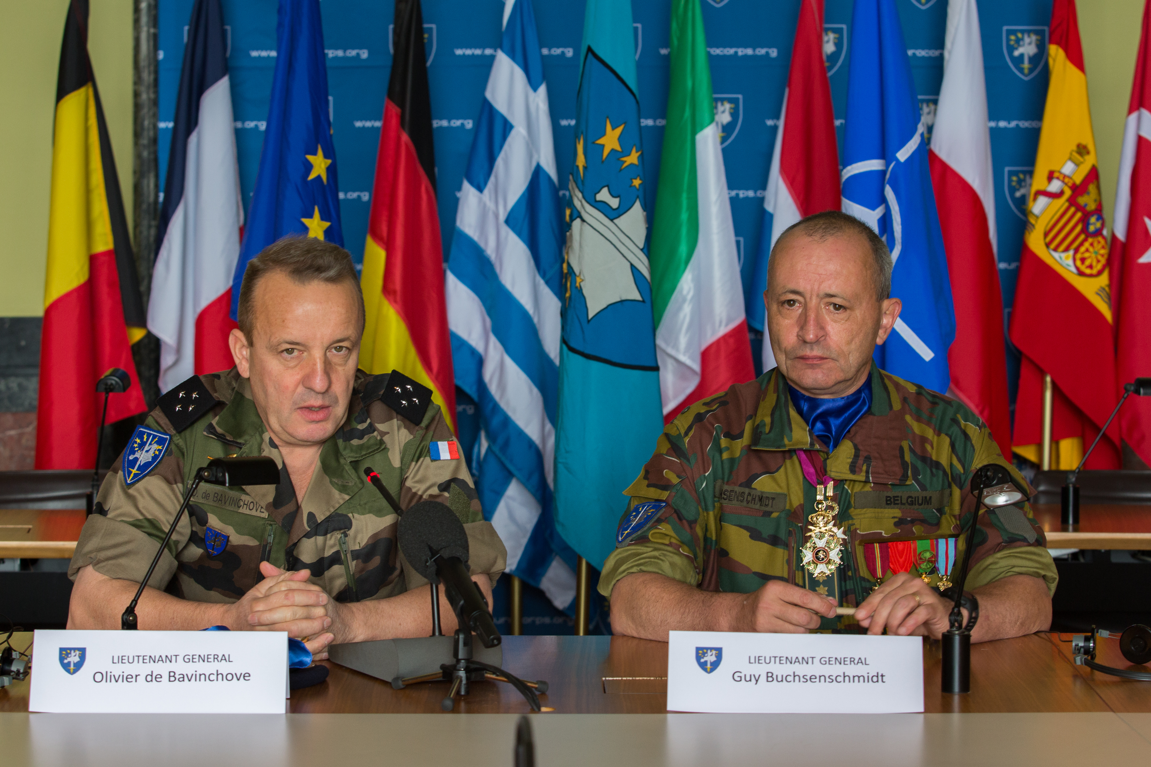 Strasbourg, 28 juin 2013, place de la République. Passage de commandement à l’Eurocorps entre les généraux Olivier de Bavinchove et Guy Buchsenschmidt.